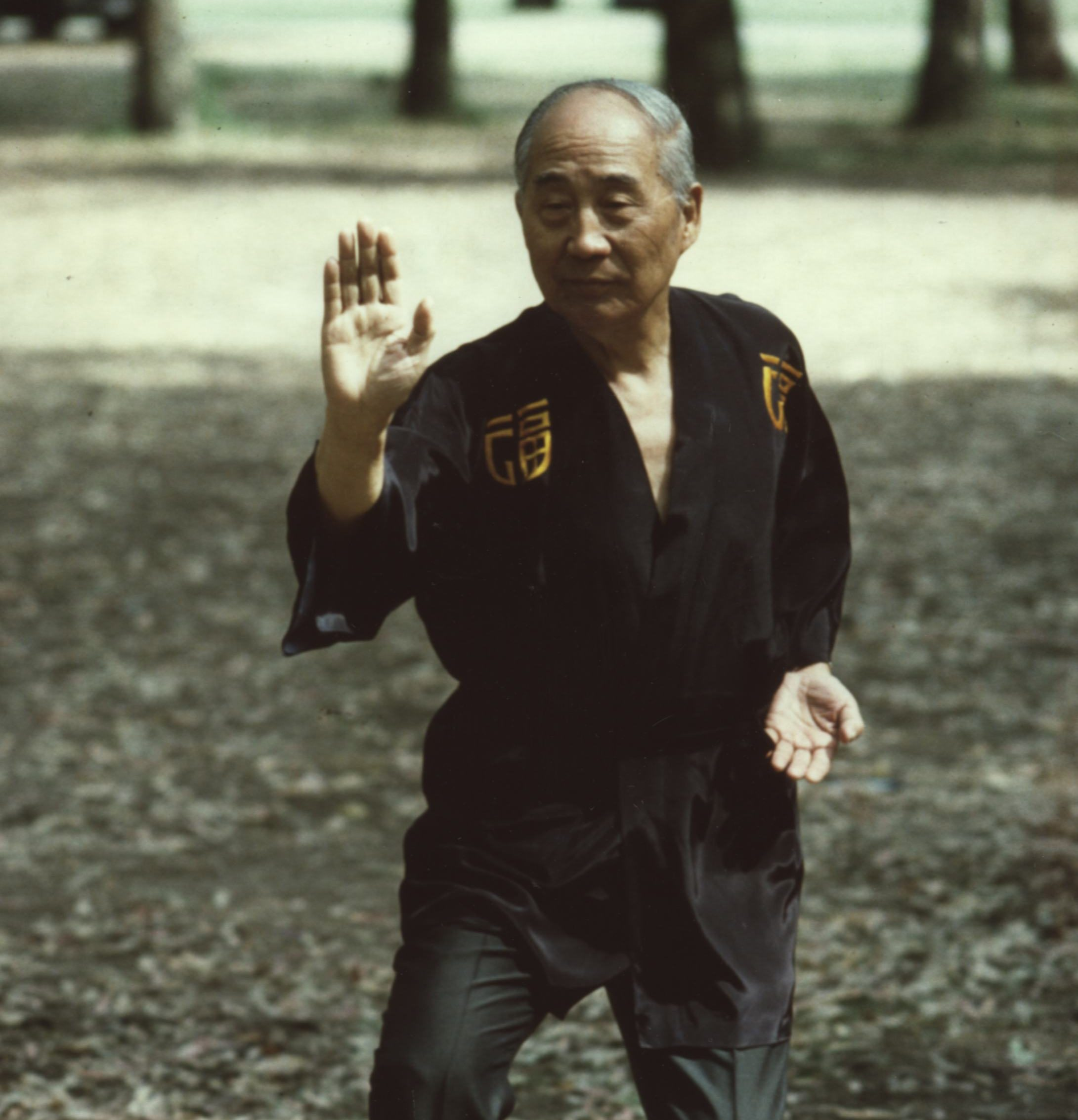 Maestro Ma Tsun Kuen ejecutando "retroceder y rechazar al mono"